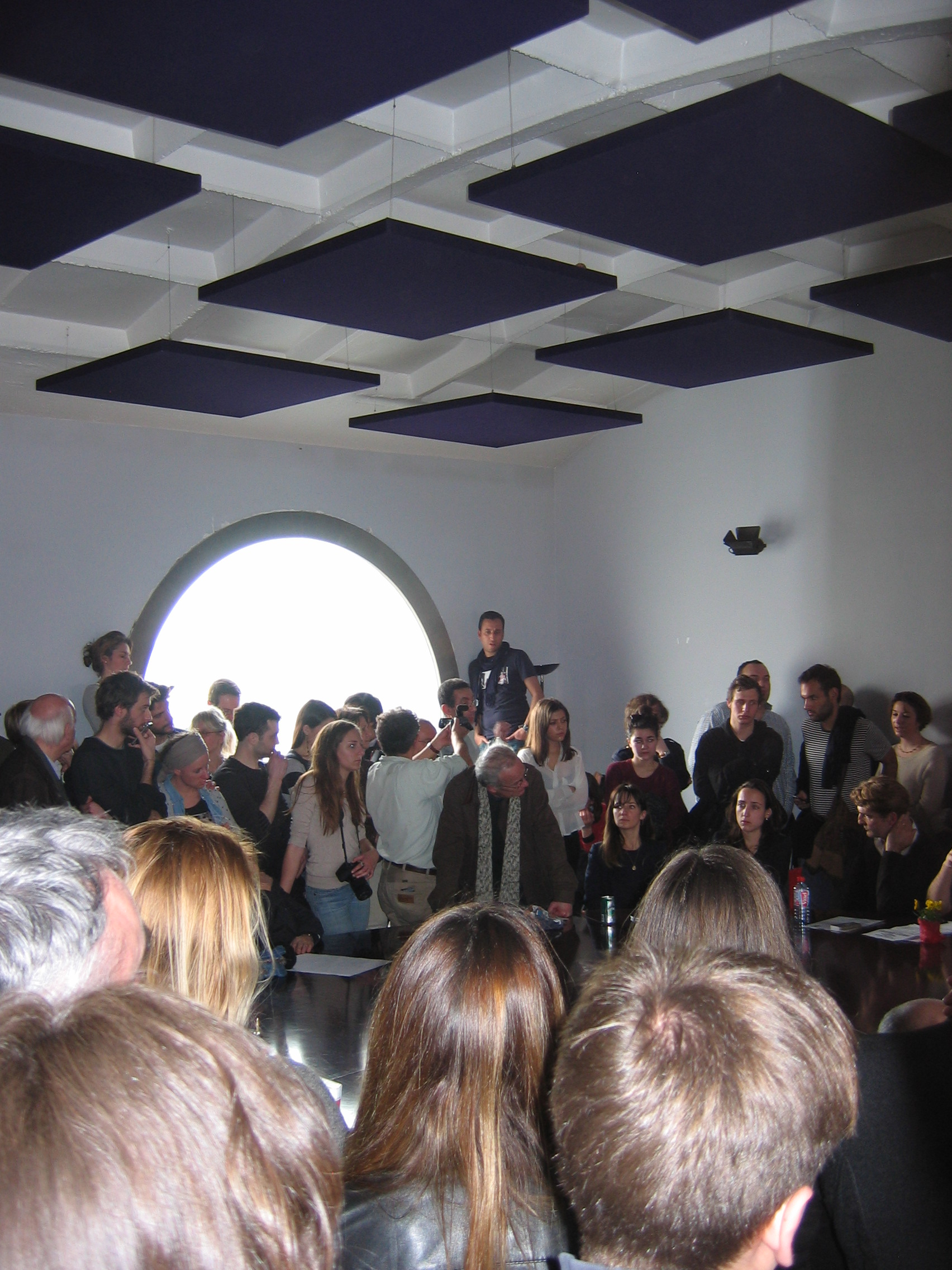 Débat salle du hublot du journal Libération 11 rue Bérenger Paris - Journée Portes ouvertes du 15 mars 2014 - Quelle presse pour demain - Assis : Alice Antheaume, Julia Cagé, Fabrice Rousselot